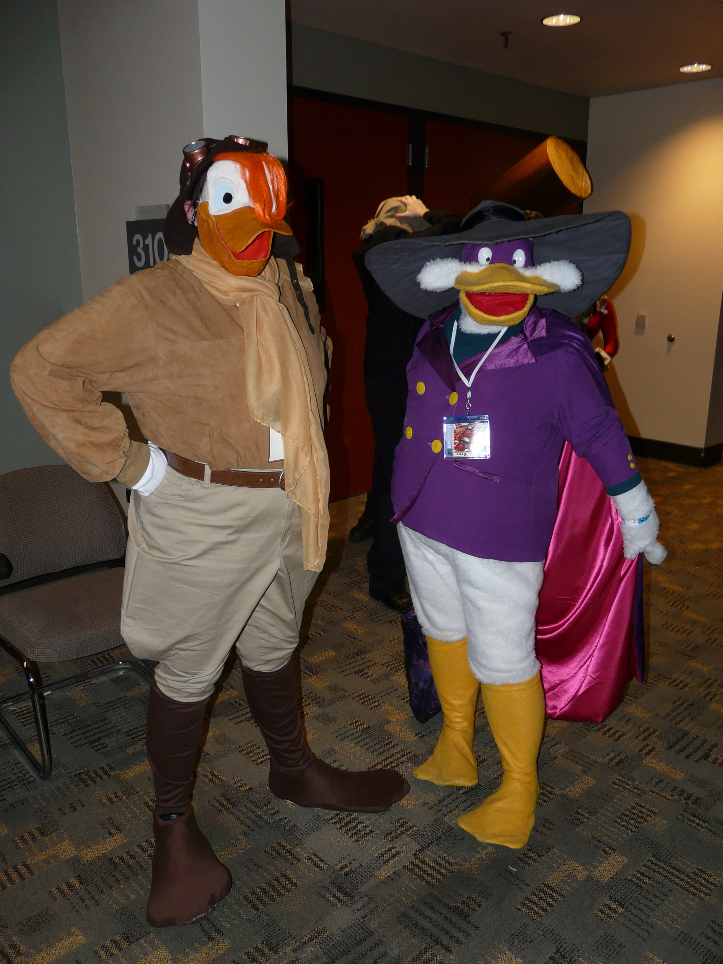 Otakon 2012 cosplay